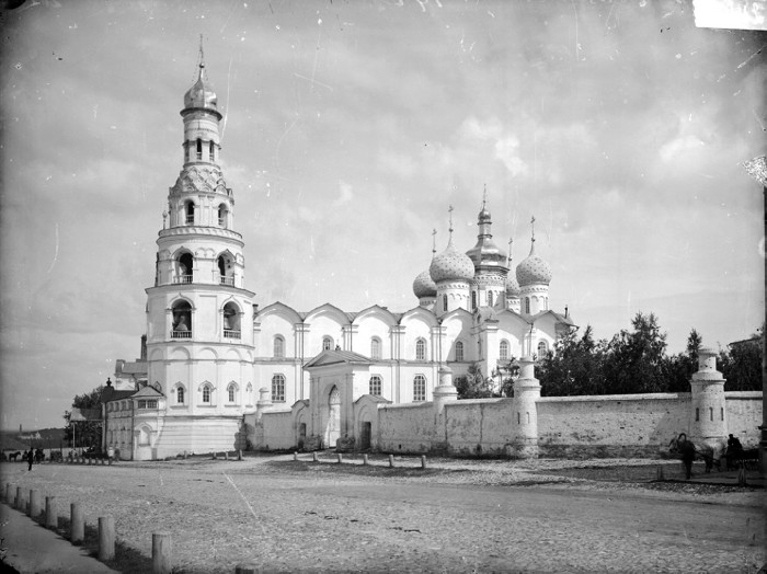 Вид на кафедральный собор. Казань.